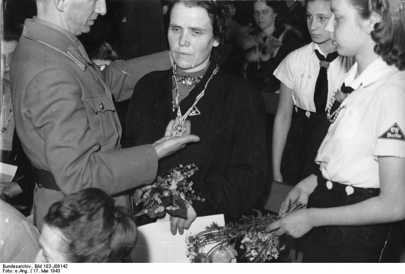 This description has been identified as biased or incorrect: DDR-Perspektive auf Hitlers KriegADN-ZB: Ehrenkreuz der deutschen Mutter verliehen Da Hitler den totalen Krieg vorbereitete, brauchte er Soldaten. Aus diesem Grunde gab es gewisse Vergünstigungen für kinderreiche Mütter, und deshalb verlieh er das Ehrenkreuz der deutschen Mutter. Das Versprechen Hitlers, keine deutsche Mutter werde durch seine Taten gezwungen sein, Tränen zu vergießen, war ein blutiger Hohn. Millionen Frauen mussten ihre Kinder und Männer für Hitlers Raubkrieg in das Massengrab des 2. Weltkrieges schicken. UBz: Auszeichnung einer abgehärmten Mutter in der Berliner Litzmannschule. 17.5.1943